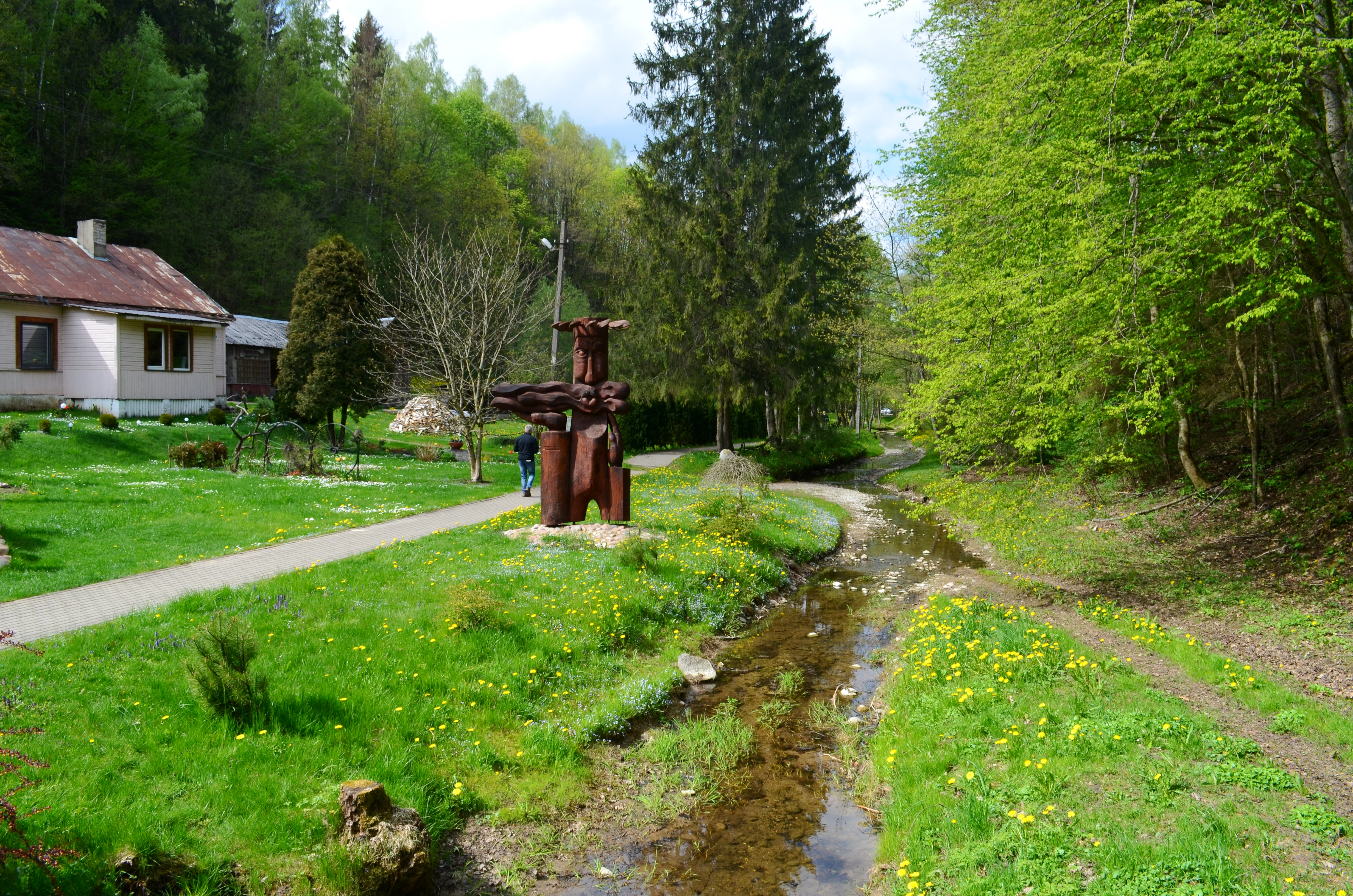 Vaiguva Plokščiuose, Šakių raj.